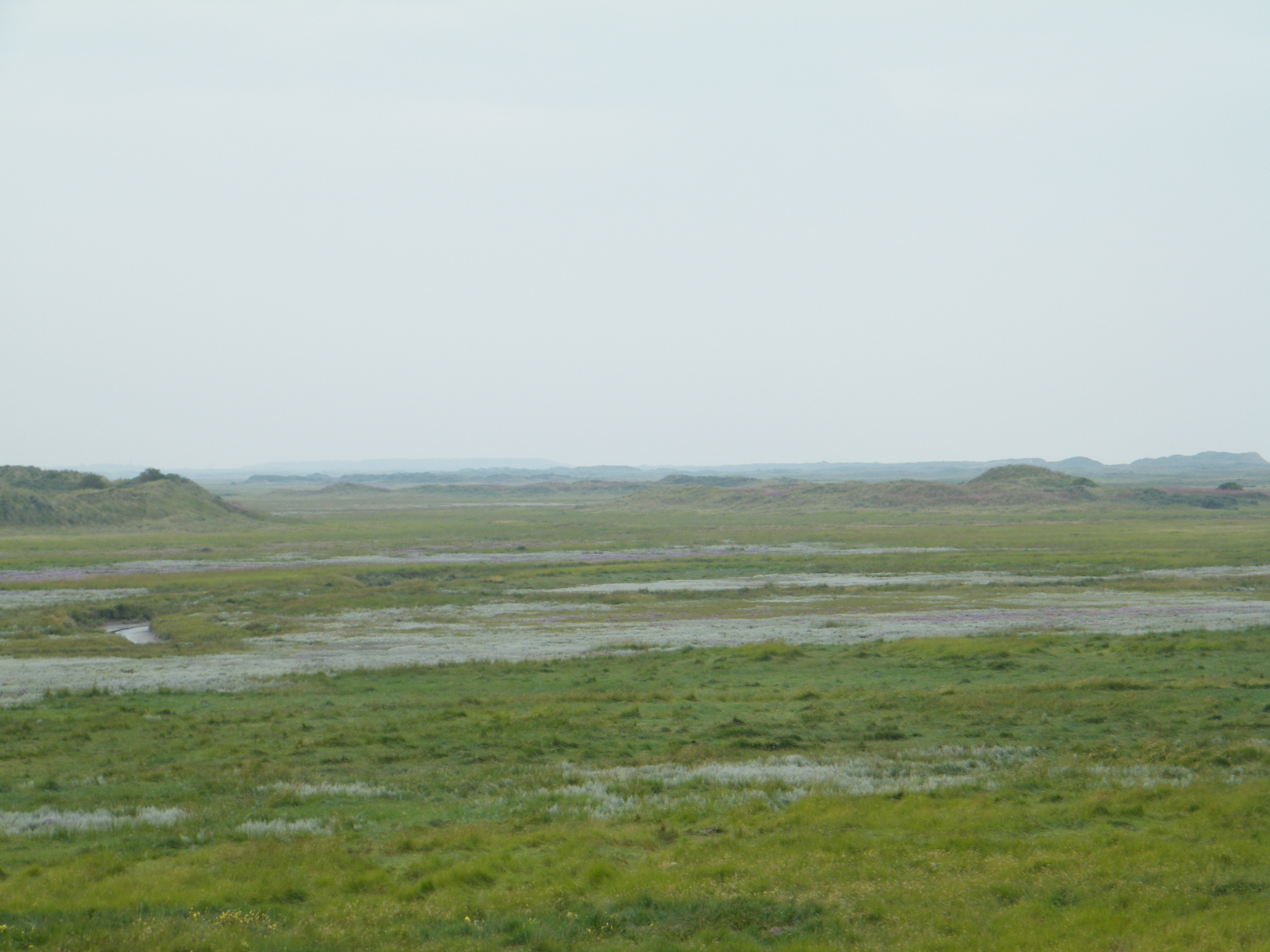 Uitzicht over de kwelder This is a photo or sound file made in Schiermonnikoog National Park in the Netherlands, with the main subject of the file in the category: landscapes